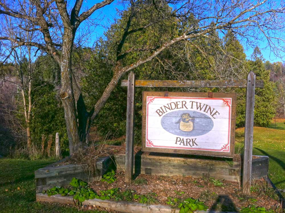 Bindertwine Park - Kleinburg, ON